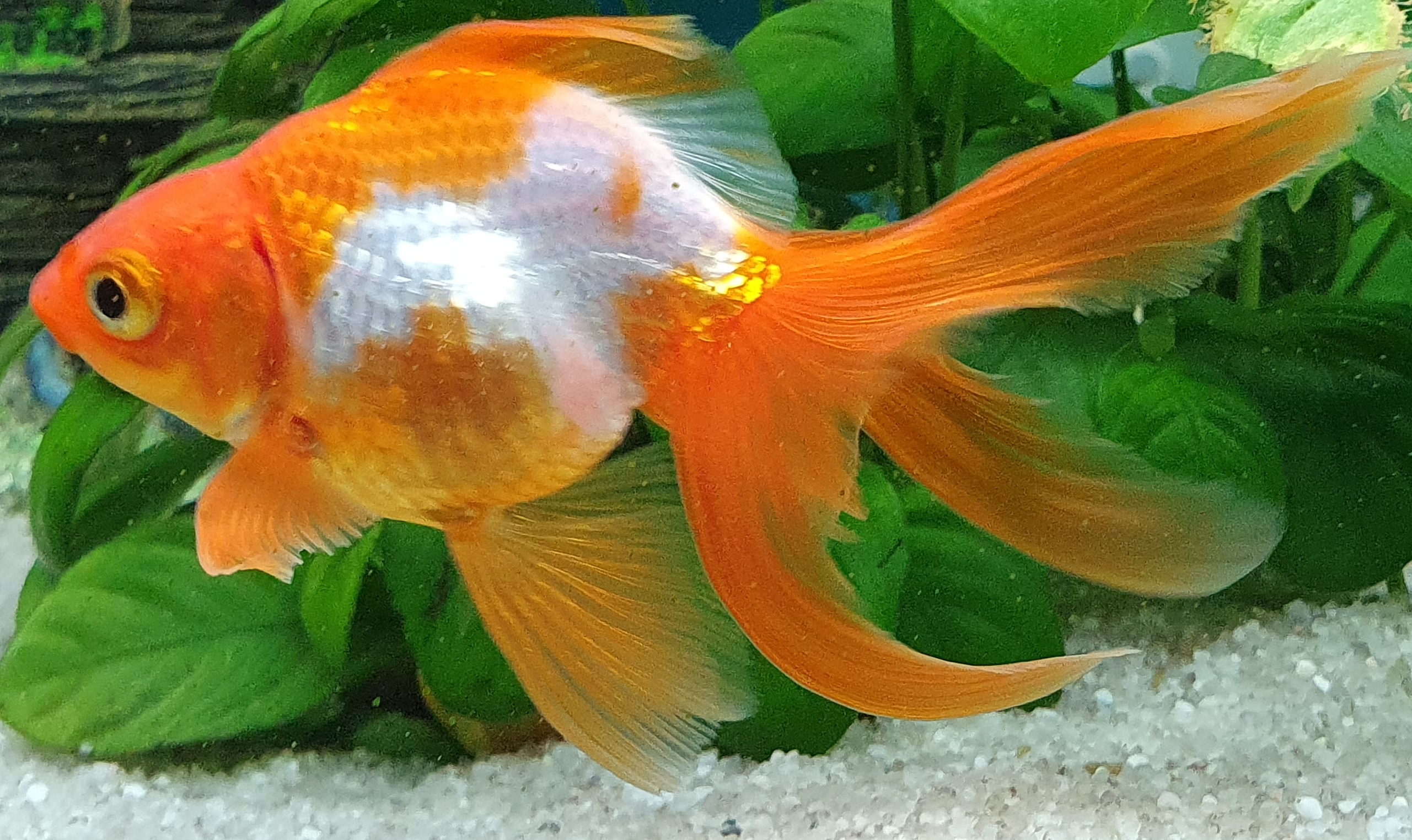 Oranda Ryukin, varietà di Oranda caratterizzata da una lunga coda a velo